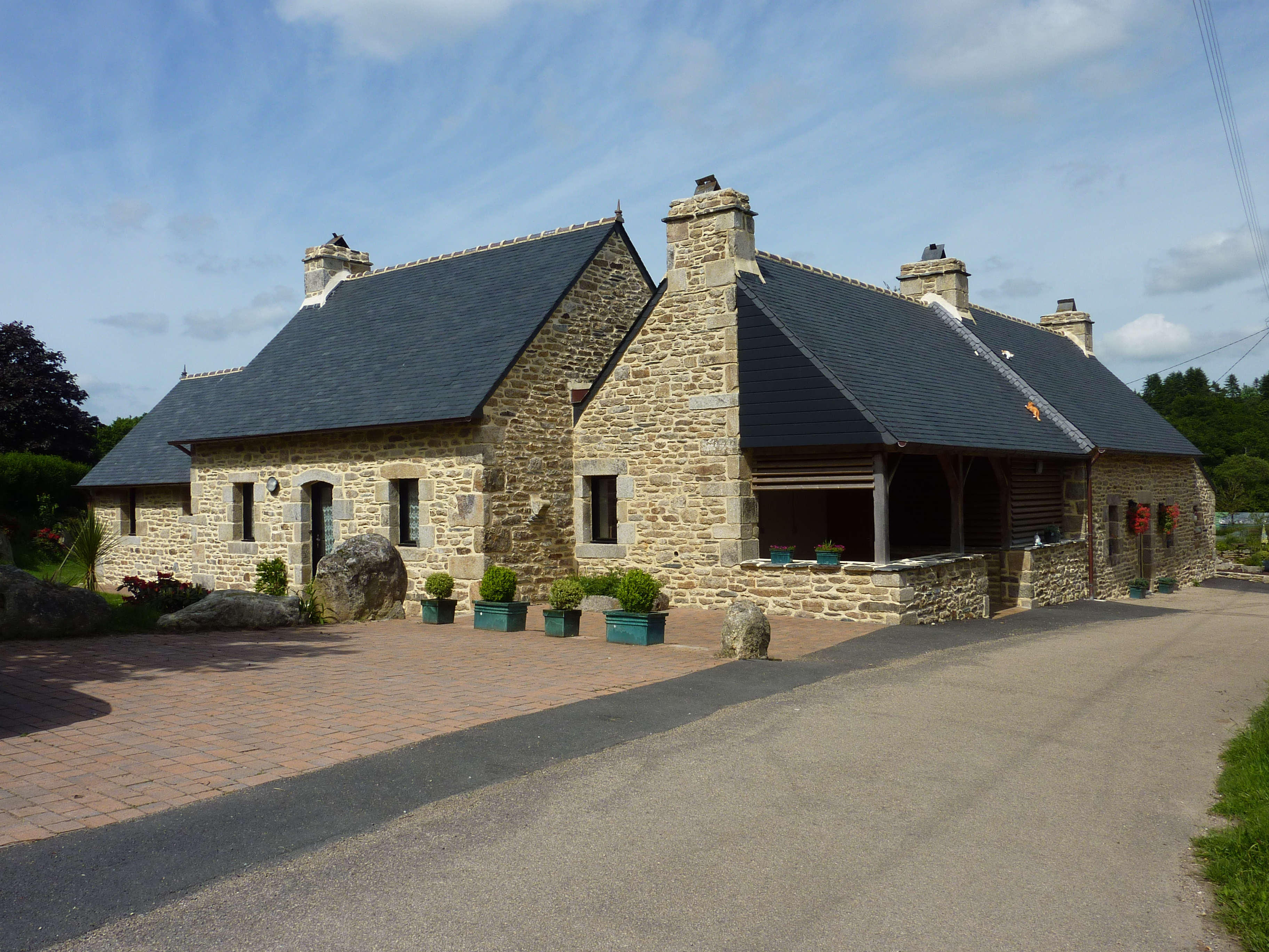 Brennilis: belle maison ancienne rénovée à Kermorvan